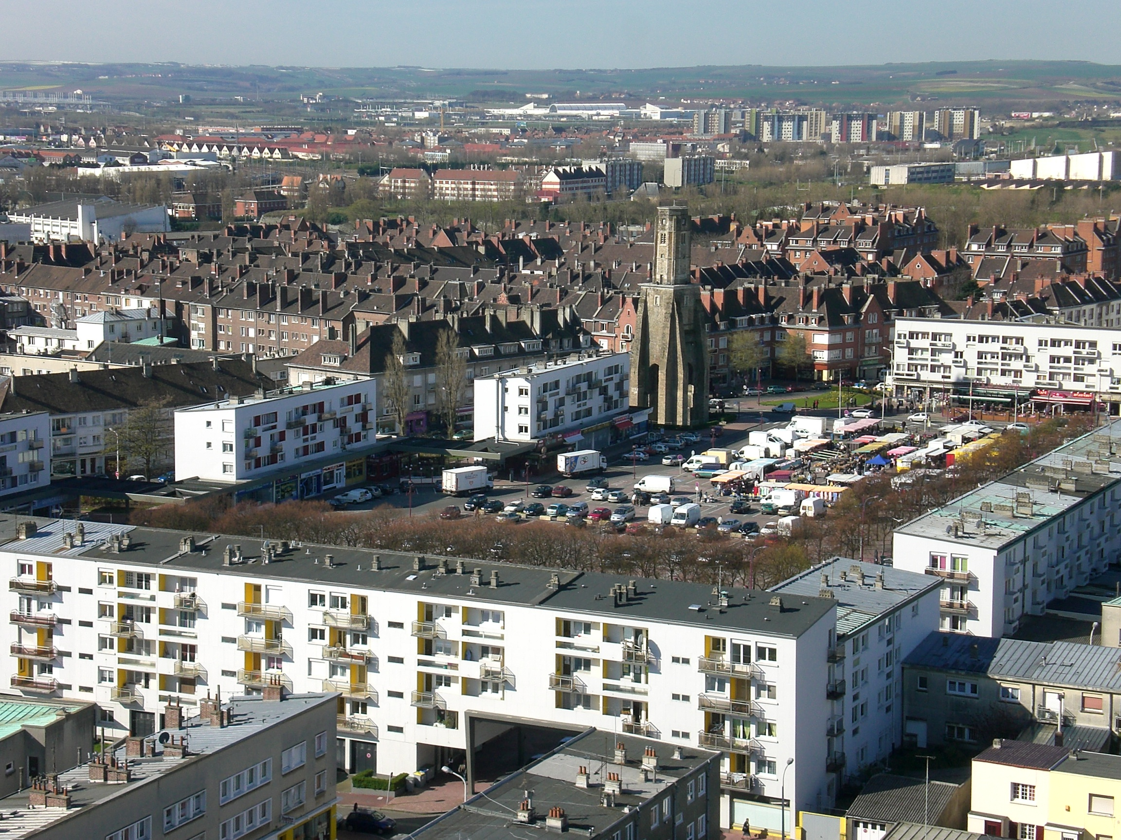 Calais Nord vu du phare en direction sud-ouest avec la Tour du Guet et à son pied la Place d'Armes et son marché. Au loin, on distingue la Cité Europe qui est le grand bâtiment blanc avec une structure principale cylindrique.